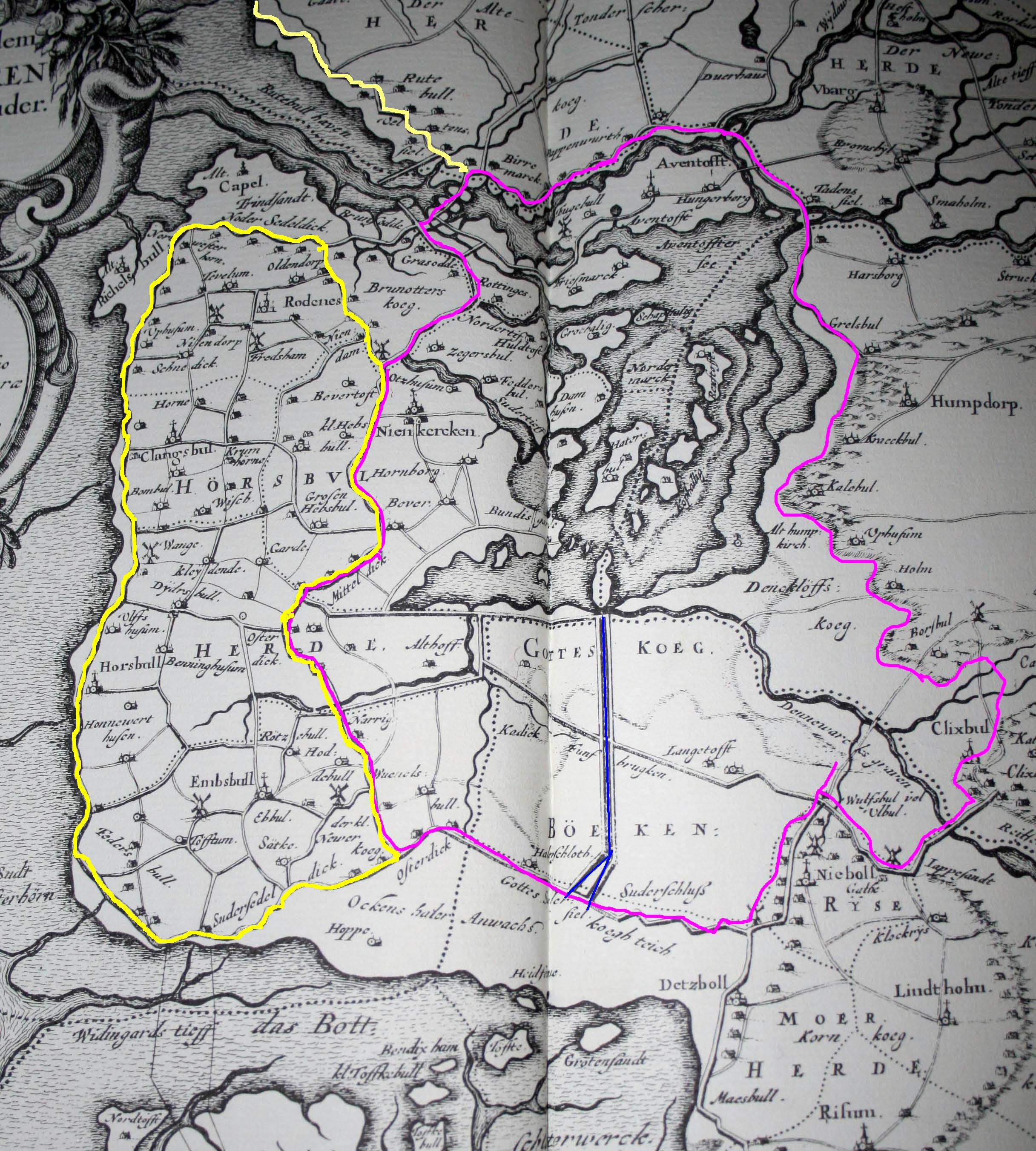 Karte der Wiedingharde und des Gotteskoogs gelb [gleich] Alter Wiedingharder Koog; lila [gleich] Gotteskoog; blau [gleich] Sielzug